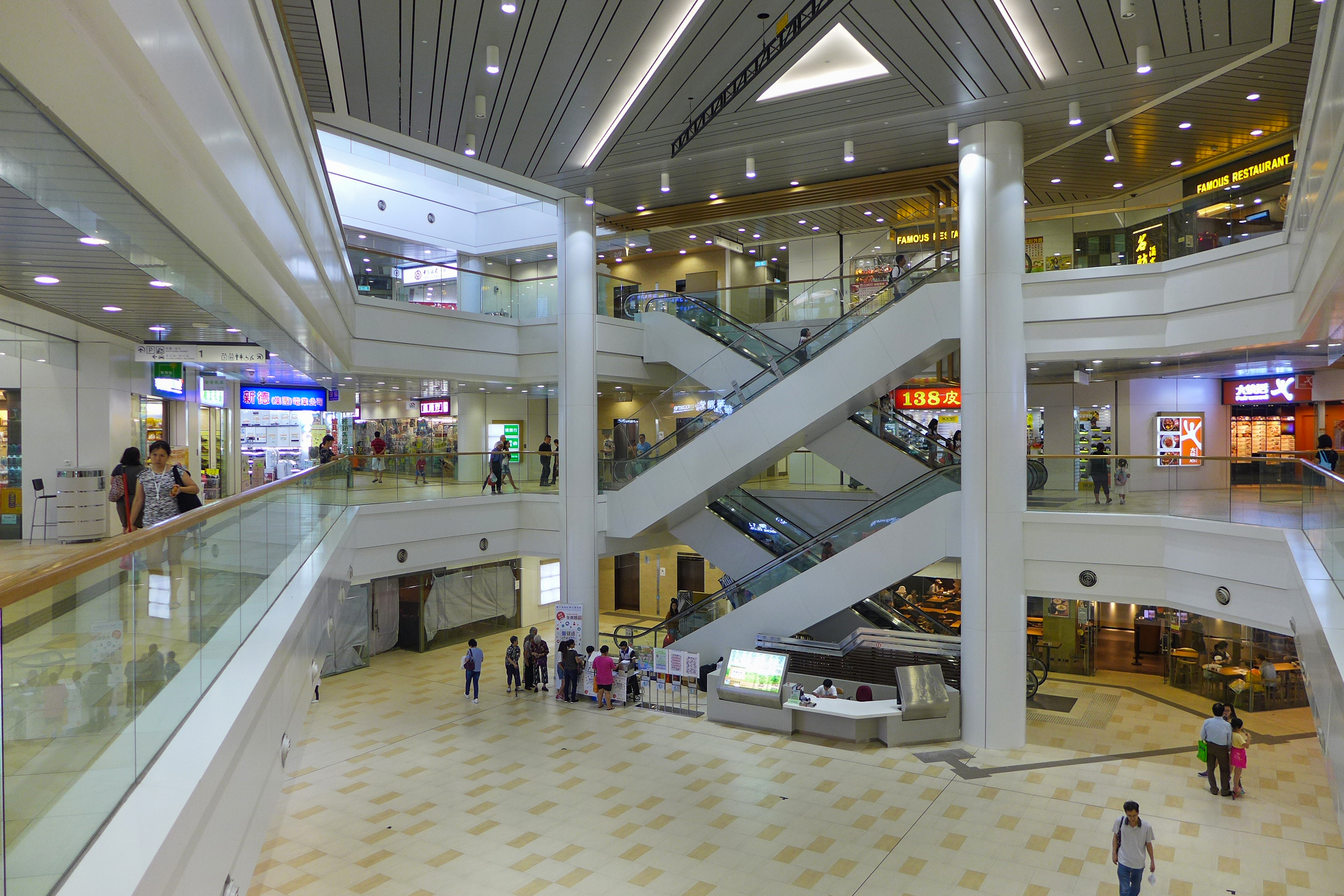 Shui Chuen O Plaza Atrium